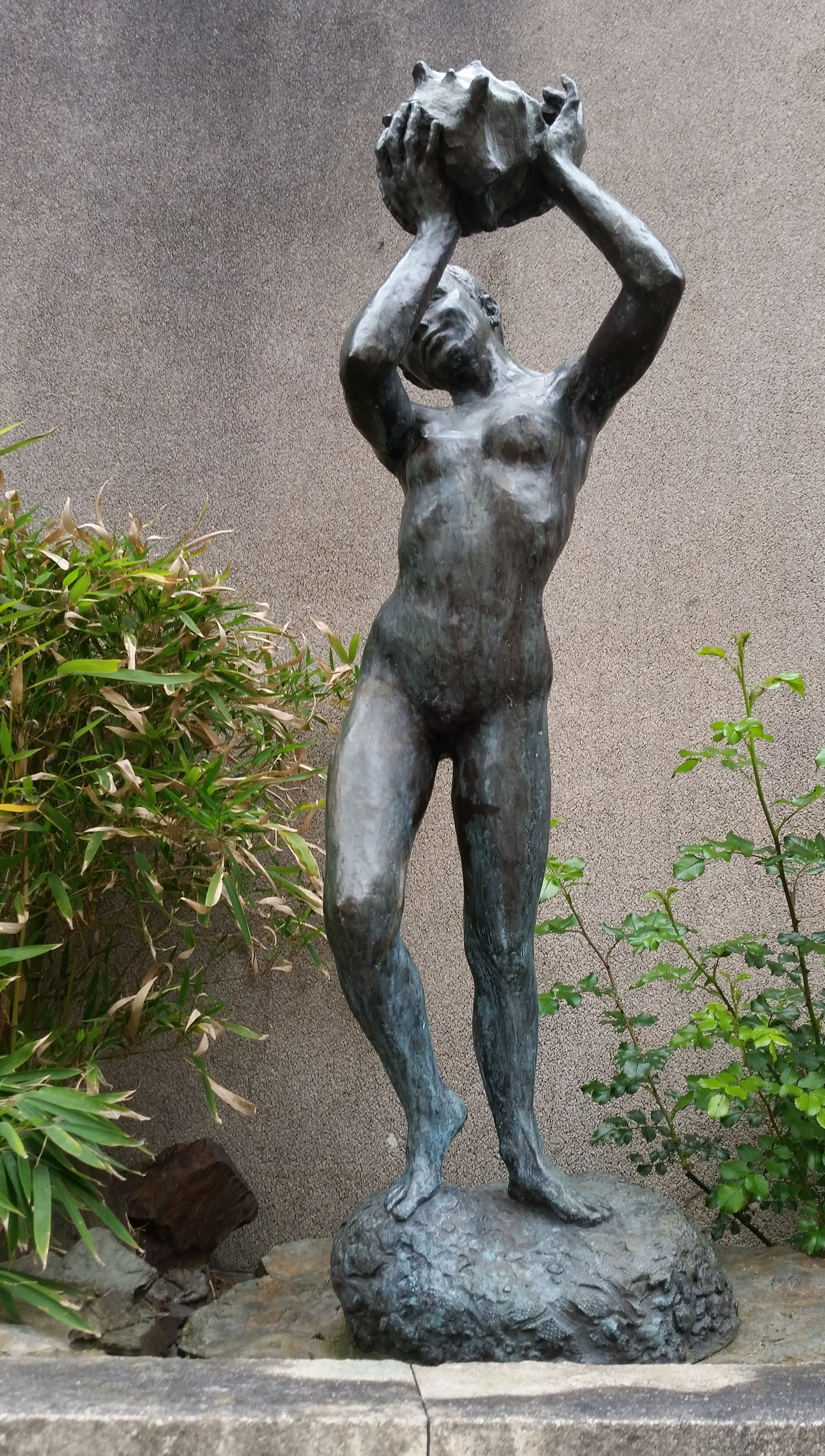 La fontaine d'amour : bronze de Stéphan Buxin (1909-1996) installée en 1989 dans l'escalier de la Fontaine d'amour à Sèvres (Hauts-de-Seine, France).